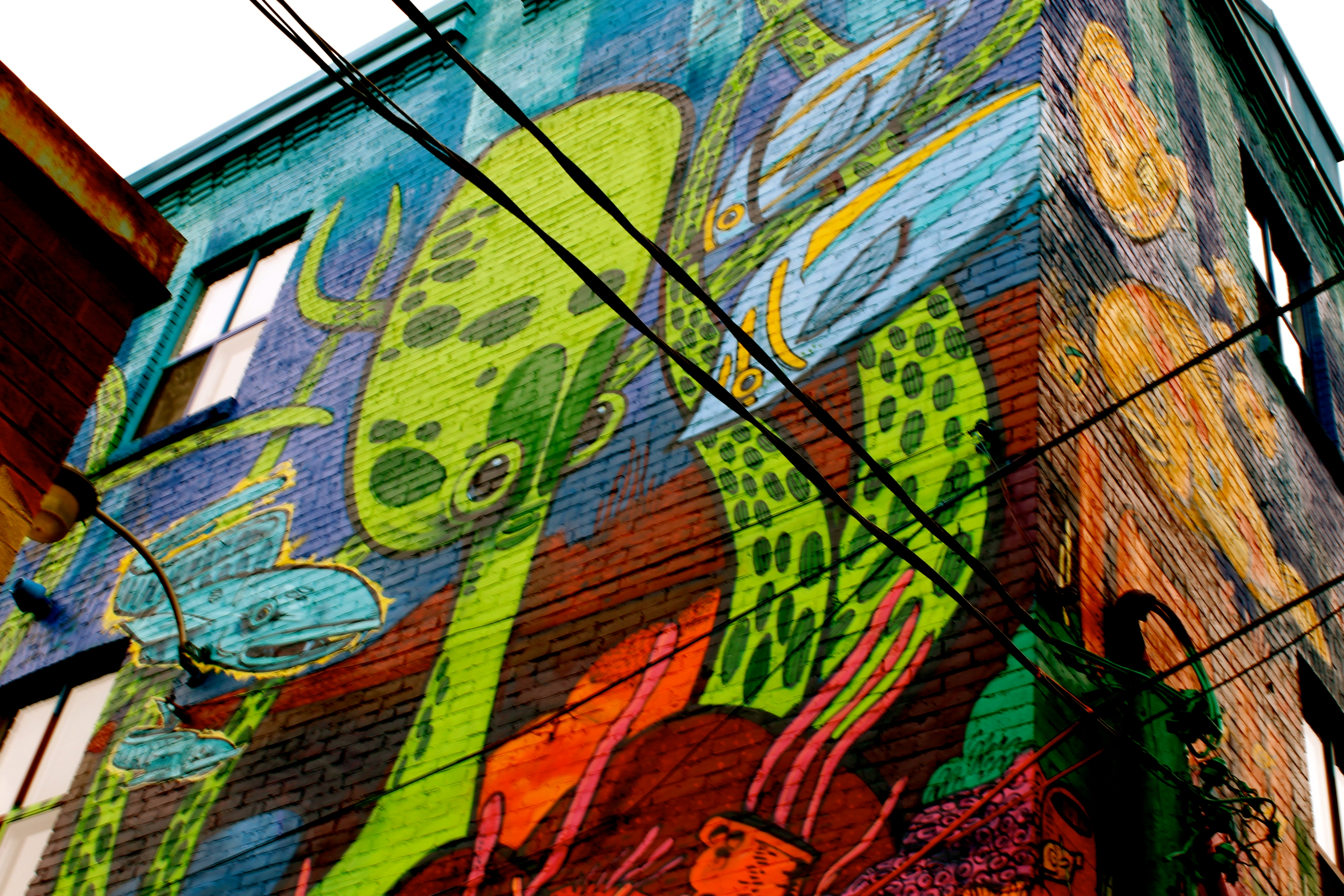 December 2013